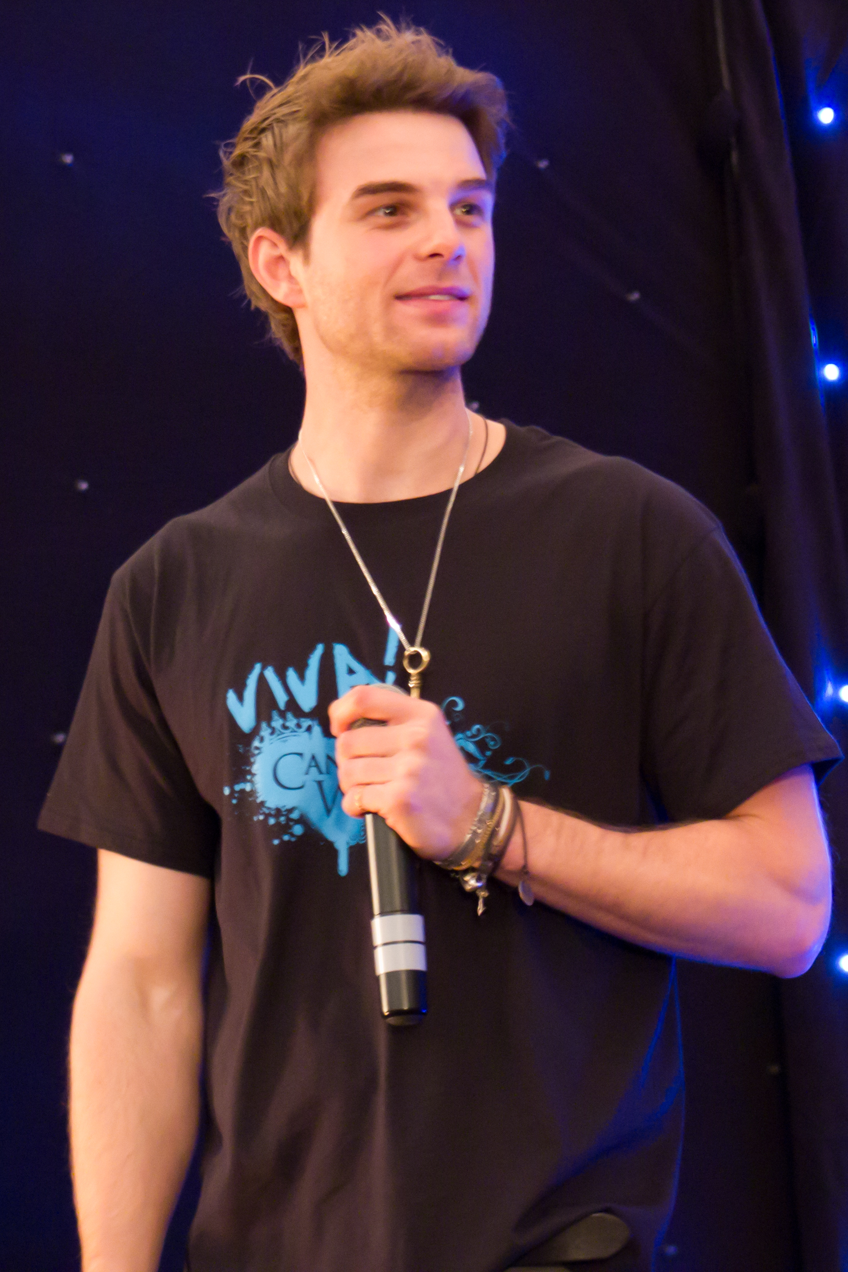 Nate Buzolic